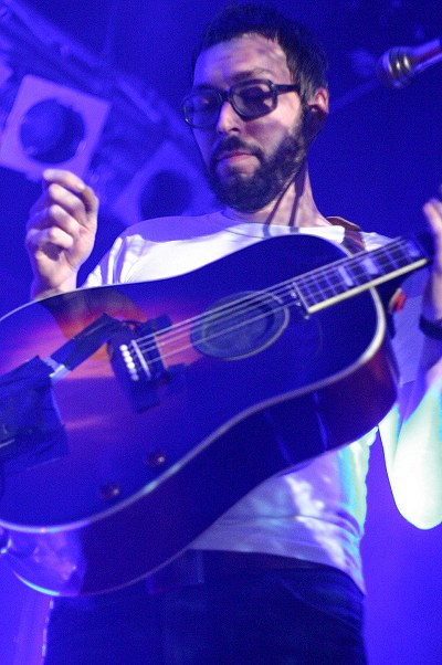 Rick McPhail beim Glacier-Konzert(11.11.06, Hamburg, Uebel&Gefährlich)